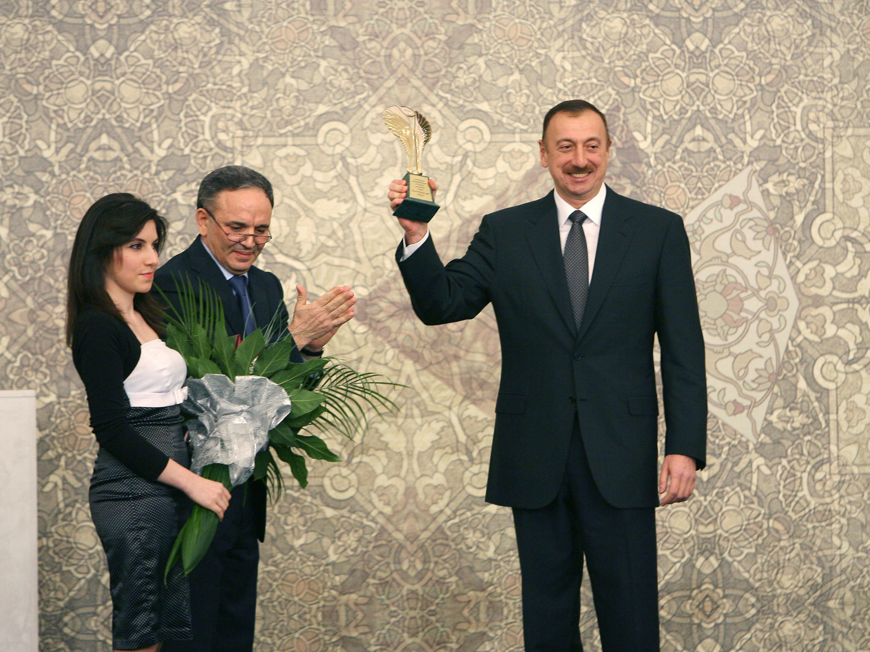 İlham Əliyevə “Jurnalistlərin dostu” mükafatının təqdim olunması mərasimi (2010)